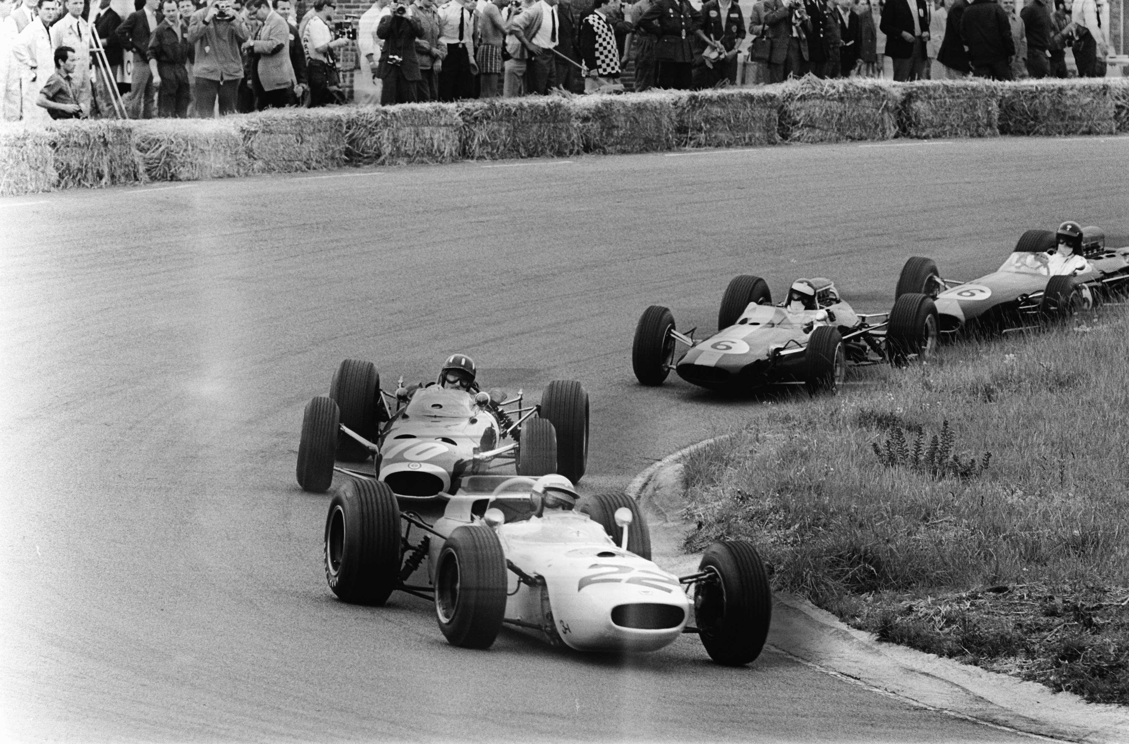 Grote Prijs van Zandvoort, Op kop de Honda van Richie Ginther gevolgd door de BRM van Graham Hill en de Lotus van Jim Clark.